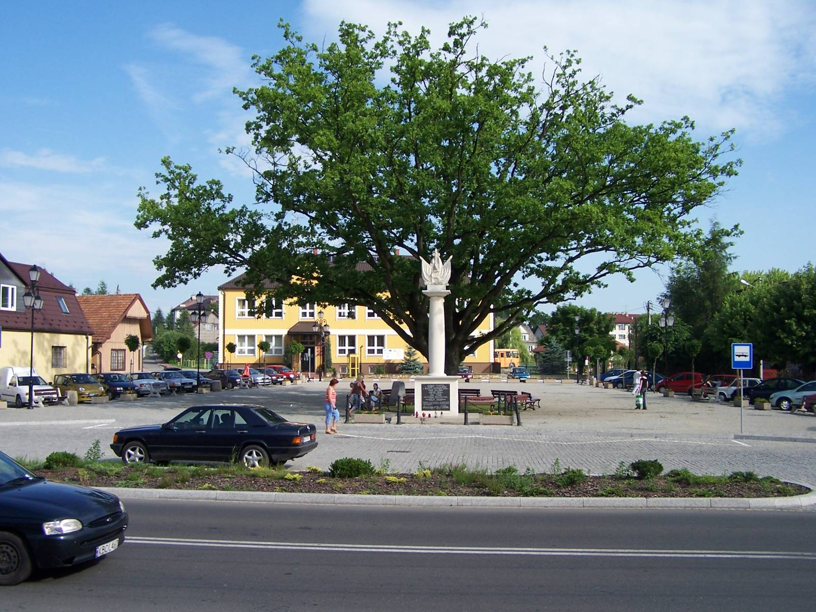 Łapanów. Rynek